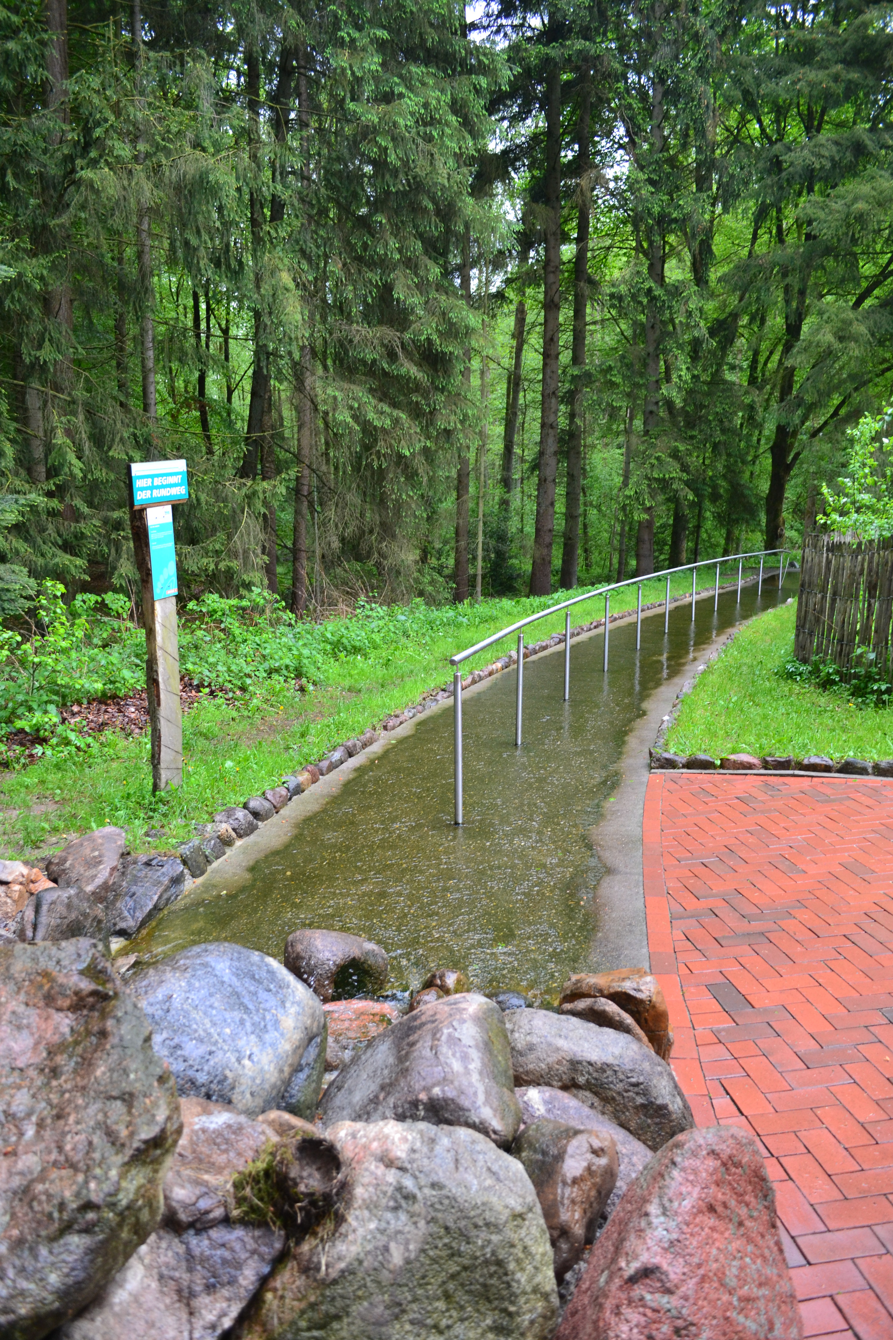 Beginn des Rundwegs des Barfußparks Egestorf.